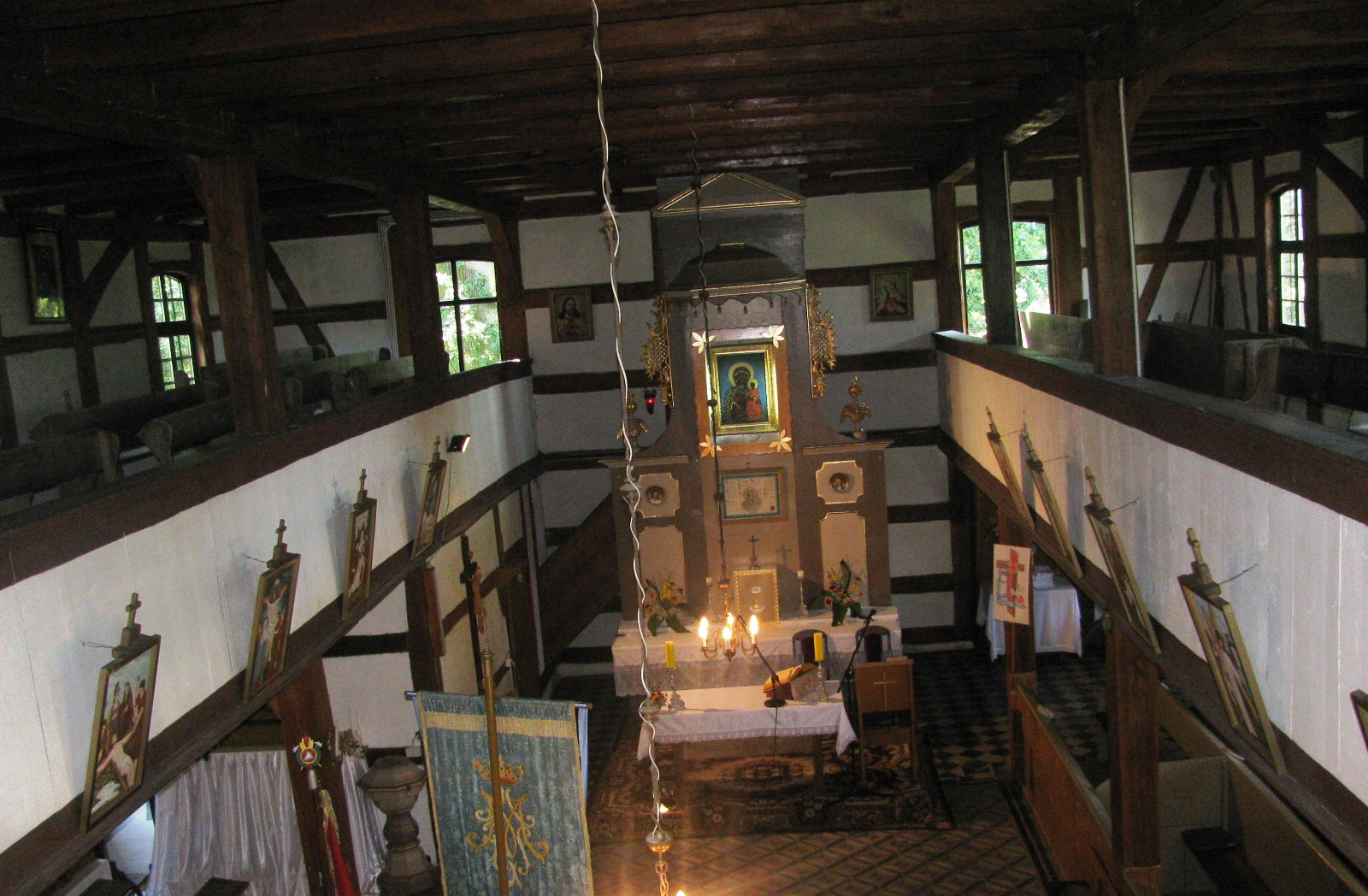 Kościół ewangelicki, ob. rzym.-kat. fil. p.w. św. Wniebowzięcia NMP, szach., 1786-1790, 1866 Radomierowice, ul. Szkolna 2, Murów 04.1964.